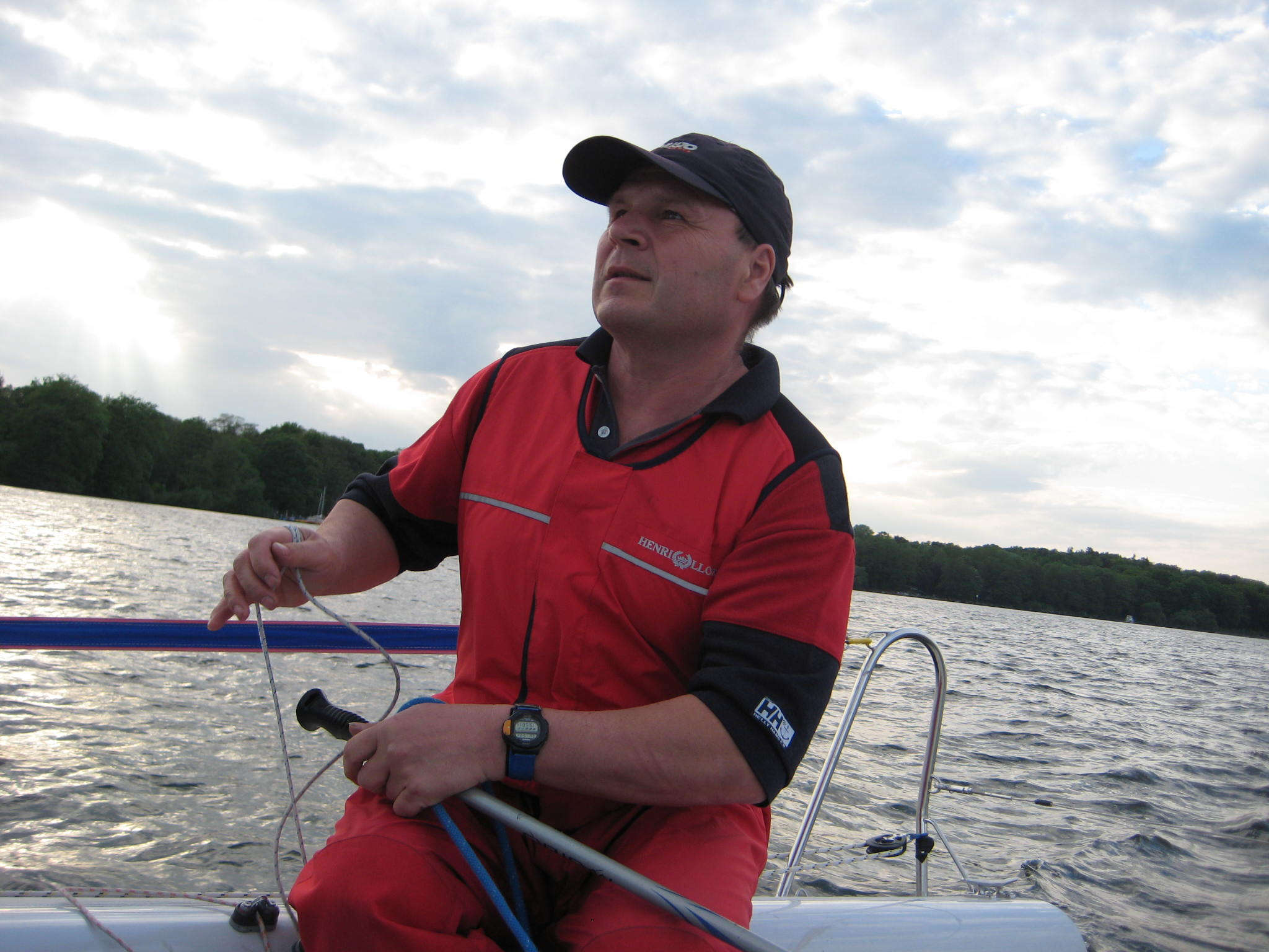 Zawsze za Sterem.